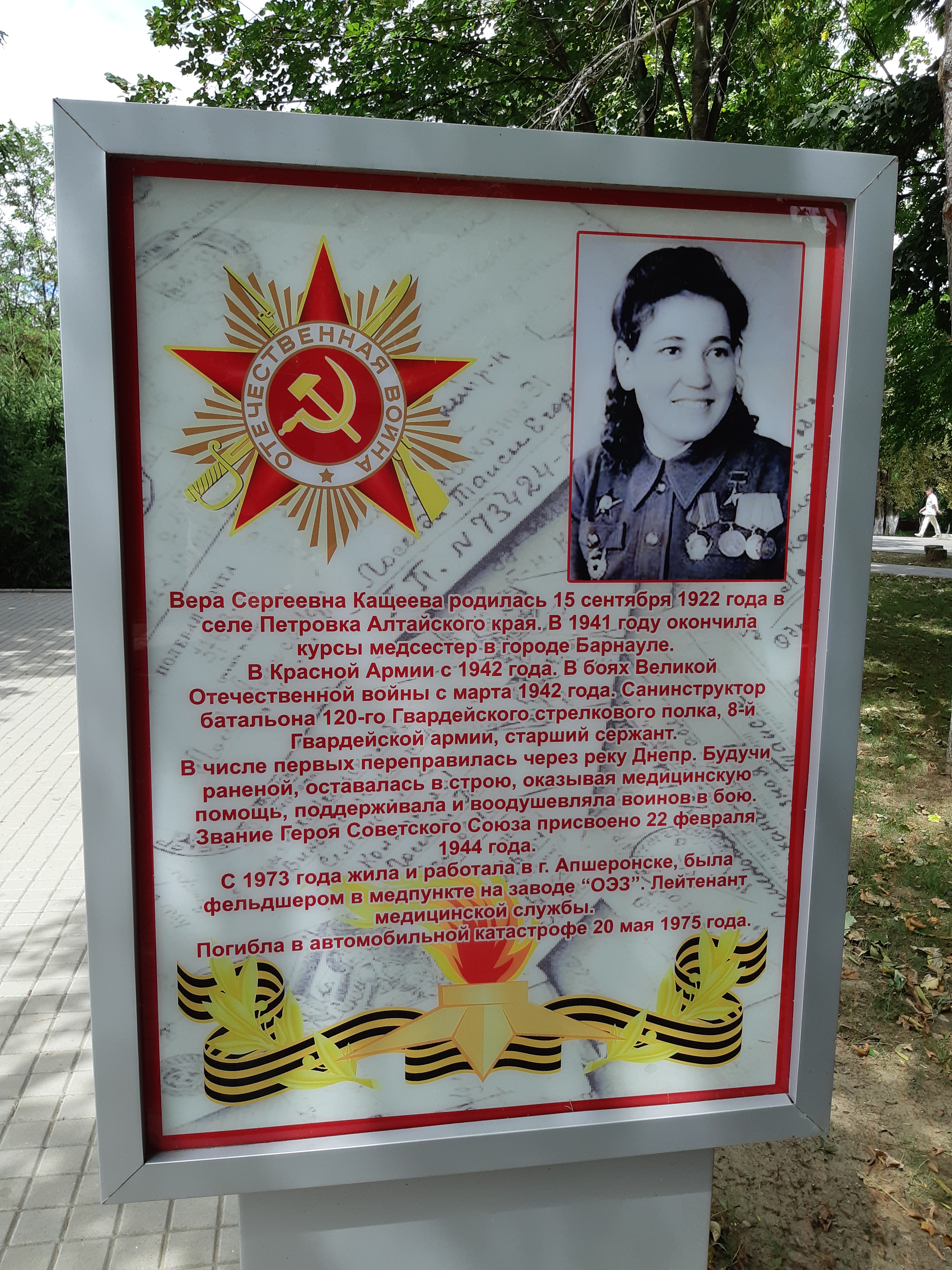 Кащеева Вера Сергеевна